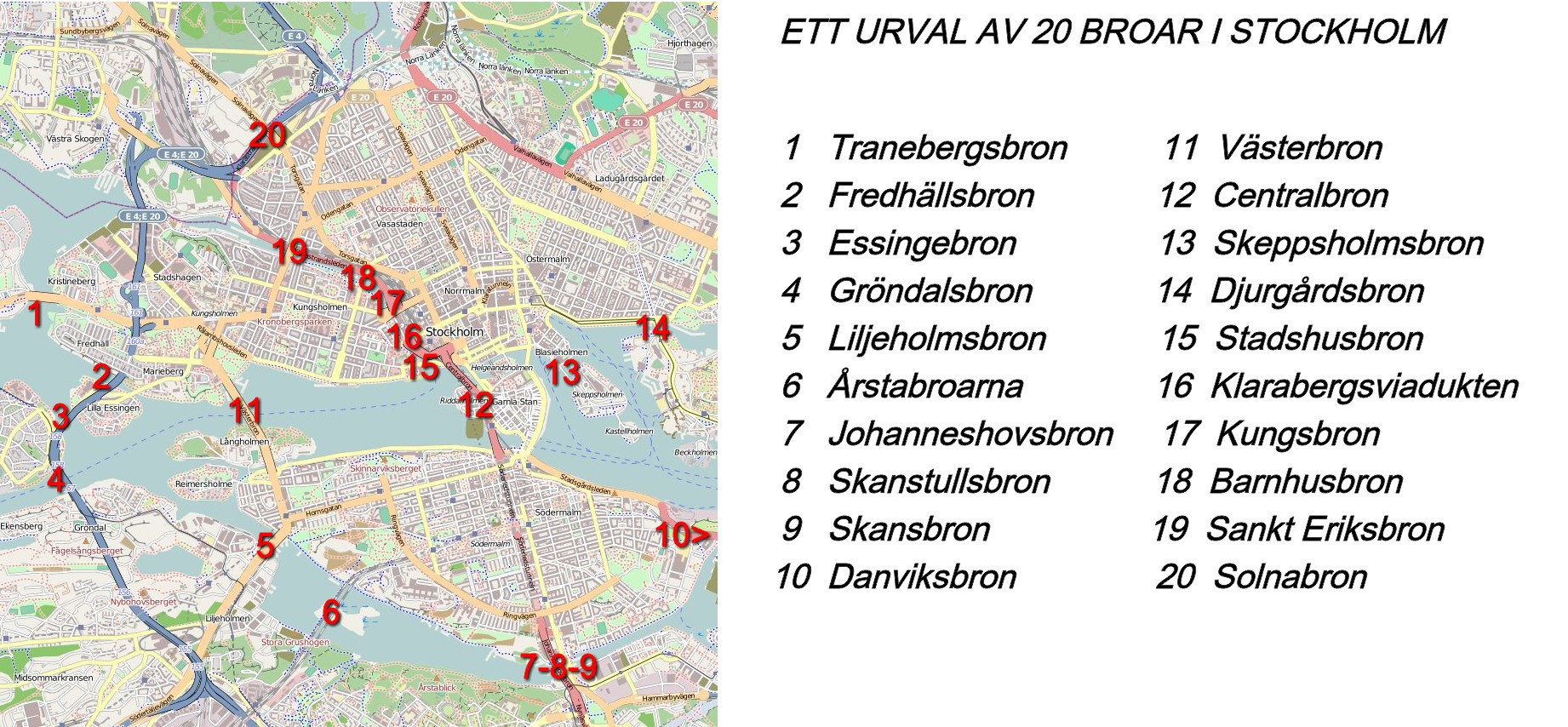 Ett urval av 20 broar i Stockholm This map may be incomplete, and may contain errors. Don't rely solely on it for navigation.